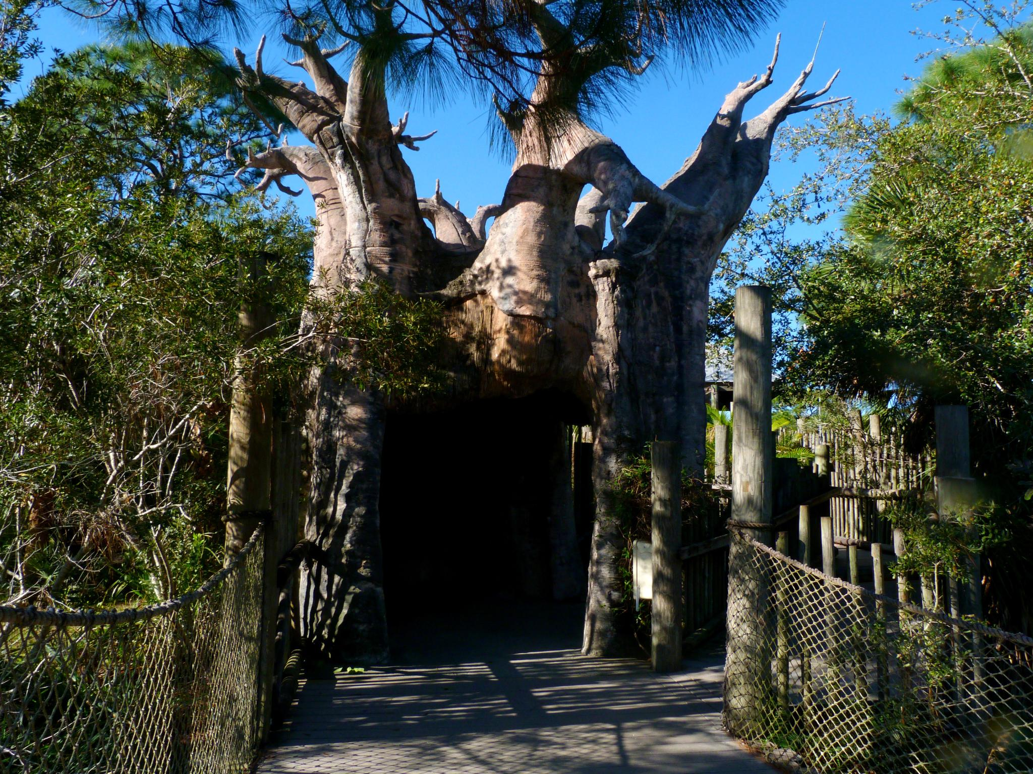 Brevard Zoo